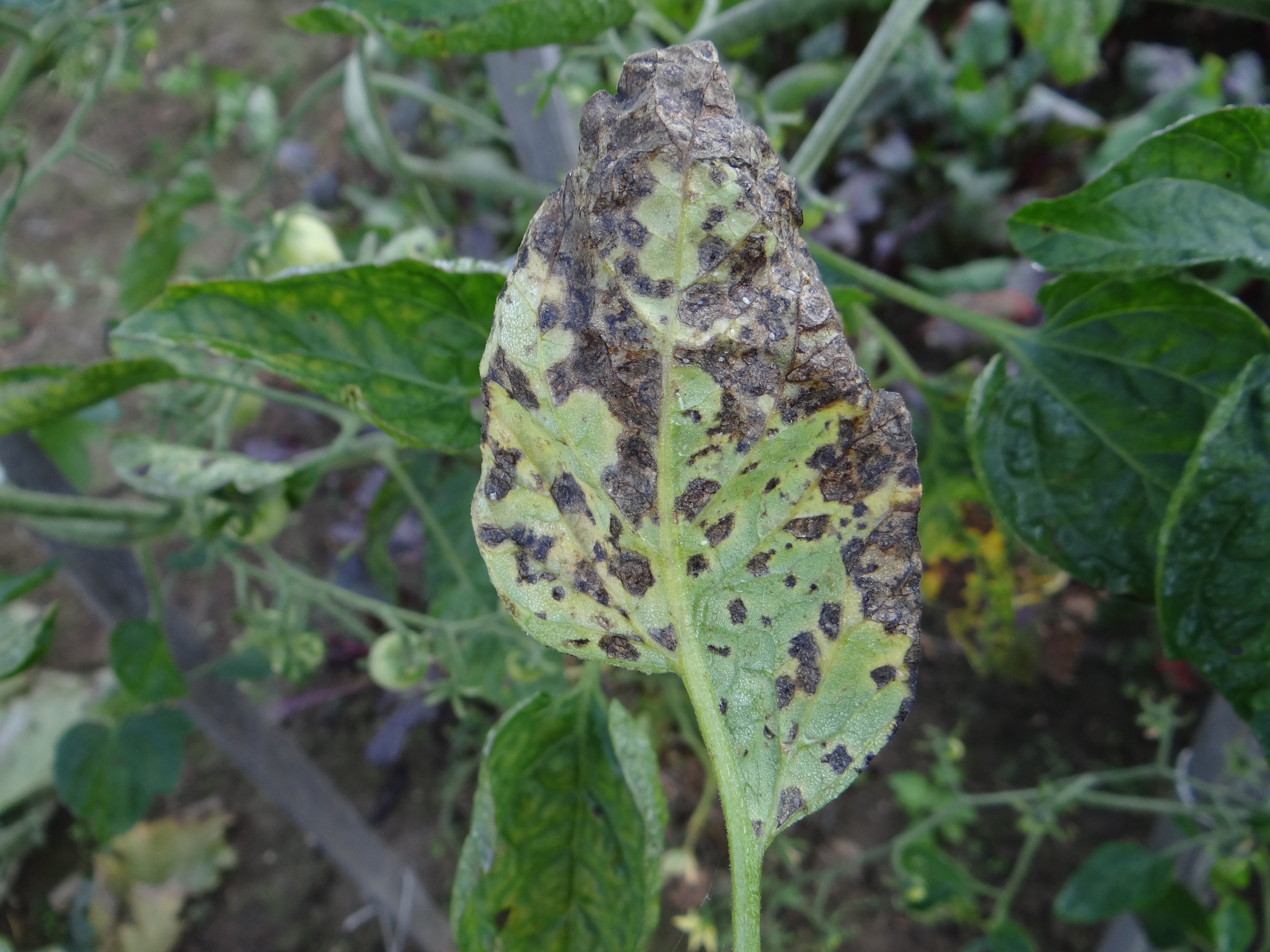 Alternaria solani on a leaf Solanum lycopersicon (bottom)